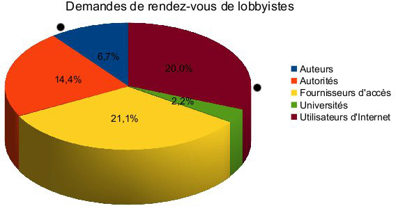 Graphique sur les demandes de rendez vous obtenus par les lobbyistes auprès de Julia Reda